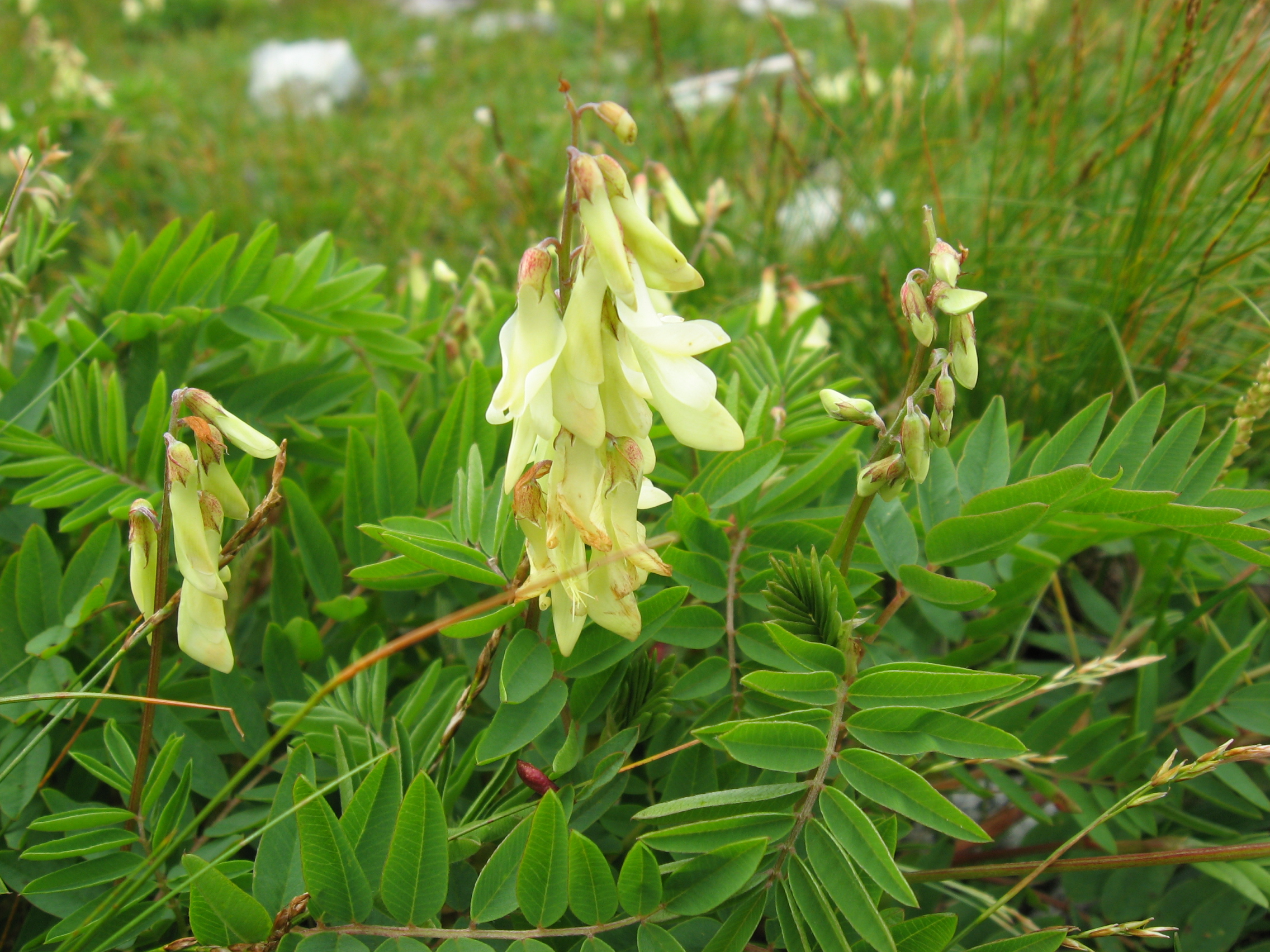 イワオウギ (Hedysarum vicioides)